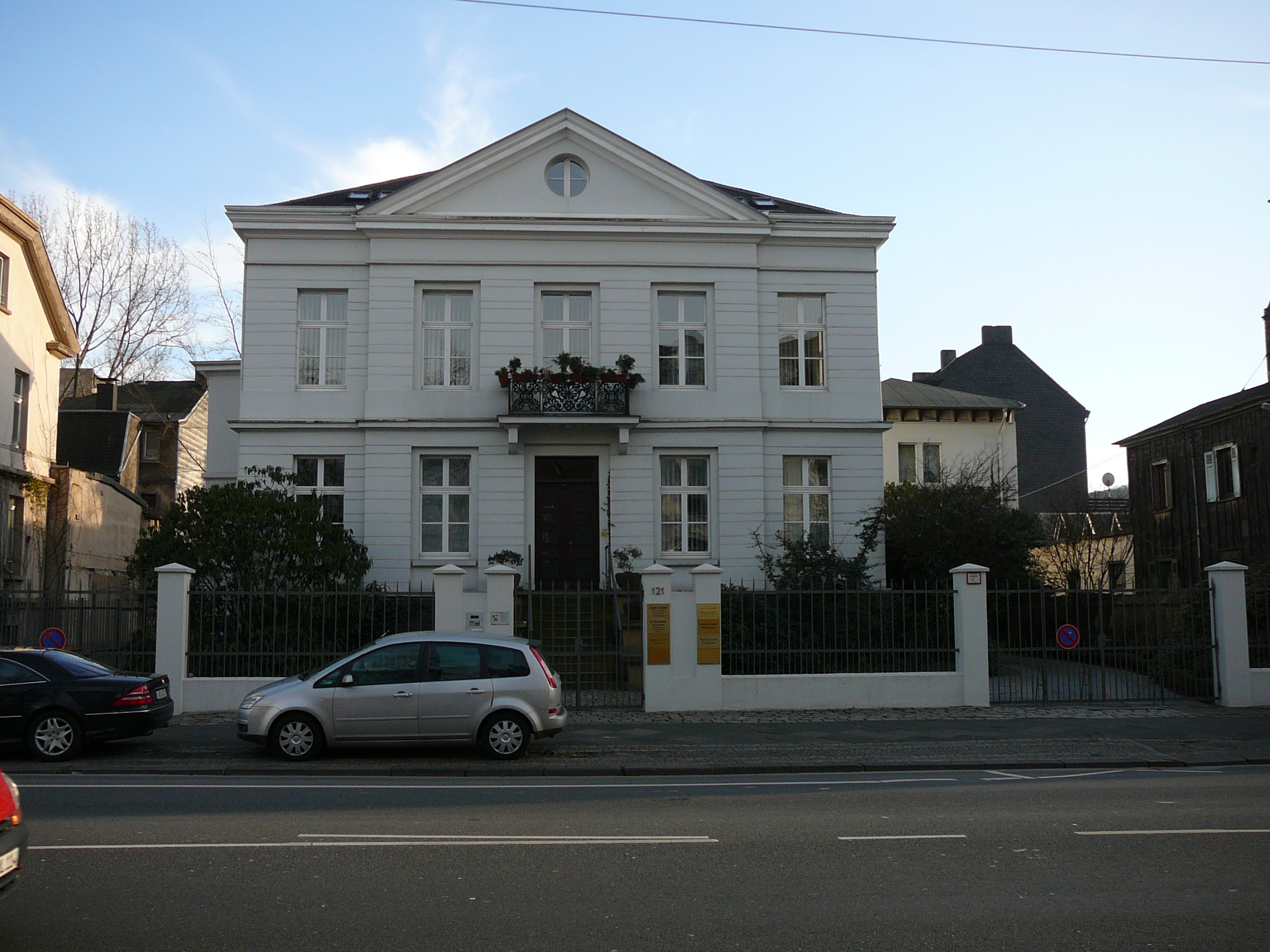 Friedrich-Ebert-Str., Wuppertal